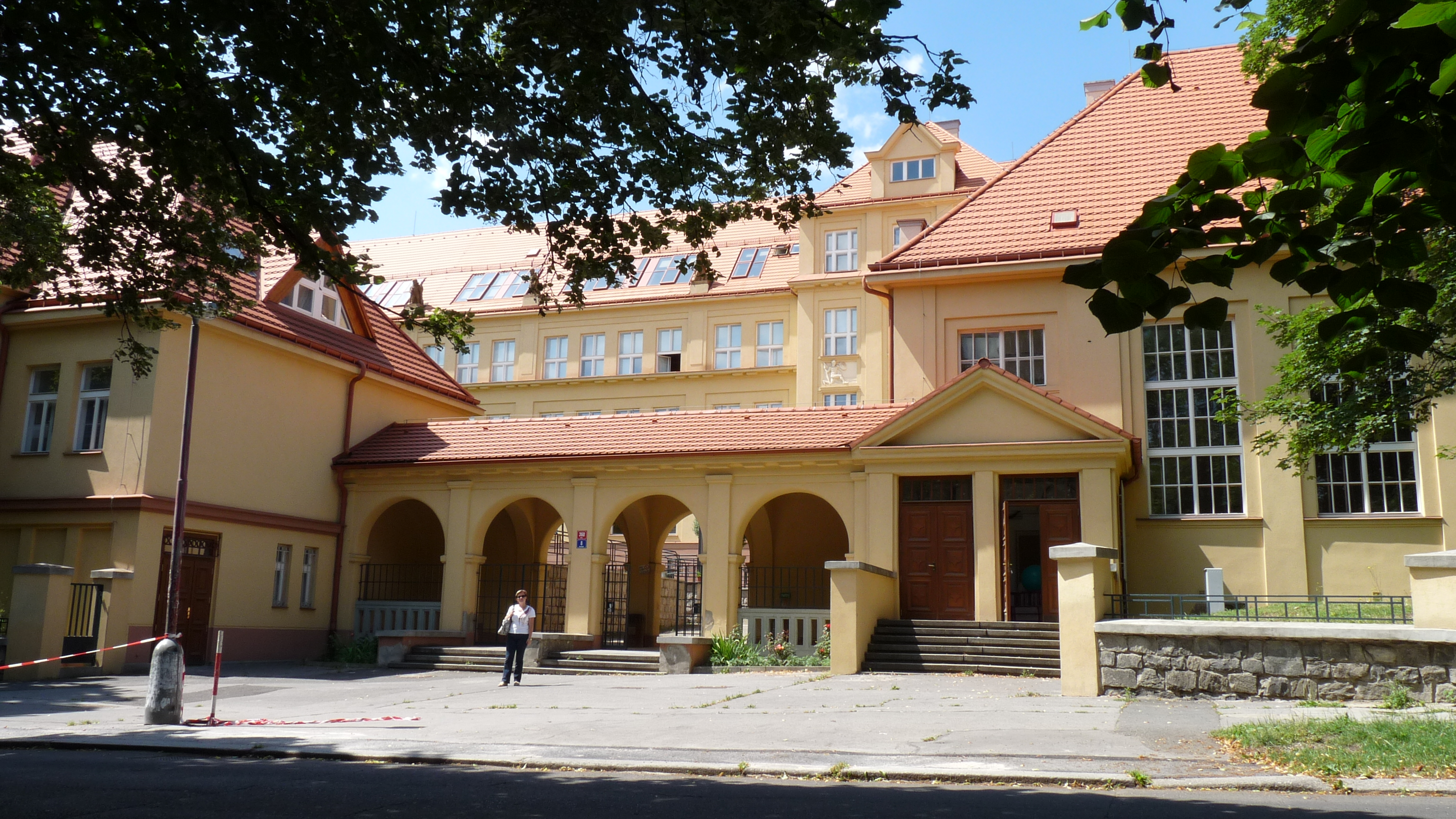 Hlavní budova UJEP - České mládeže 8